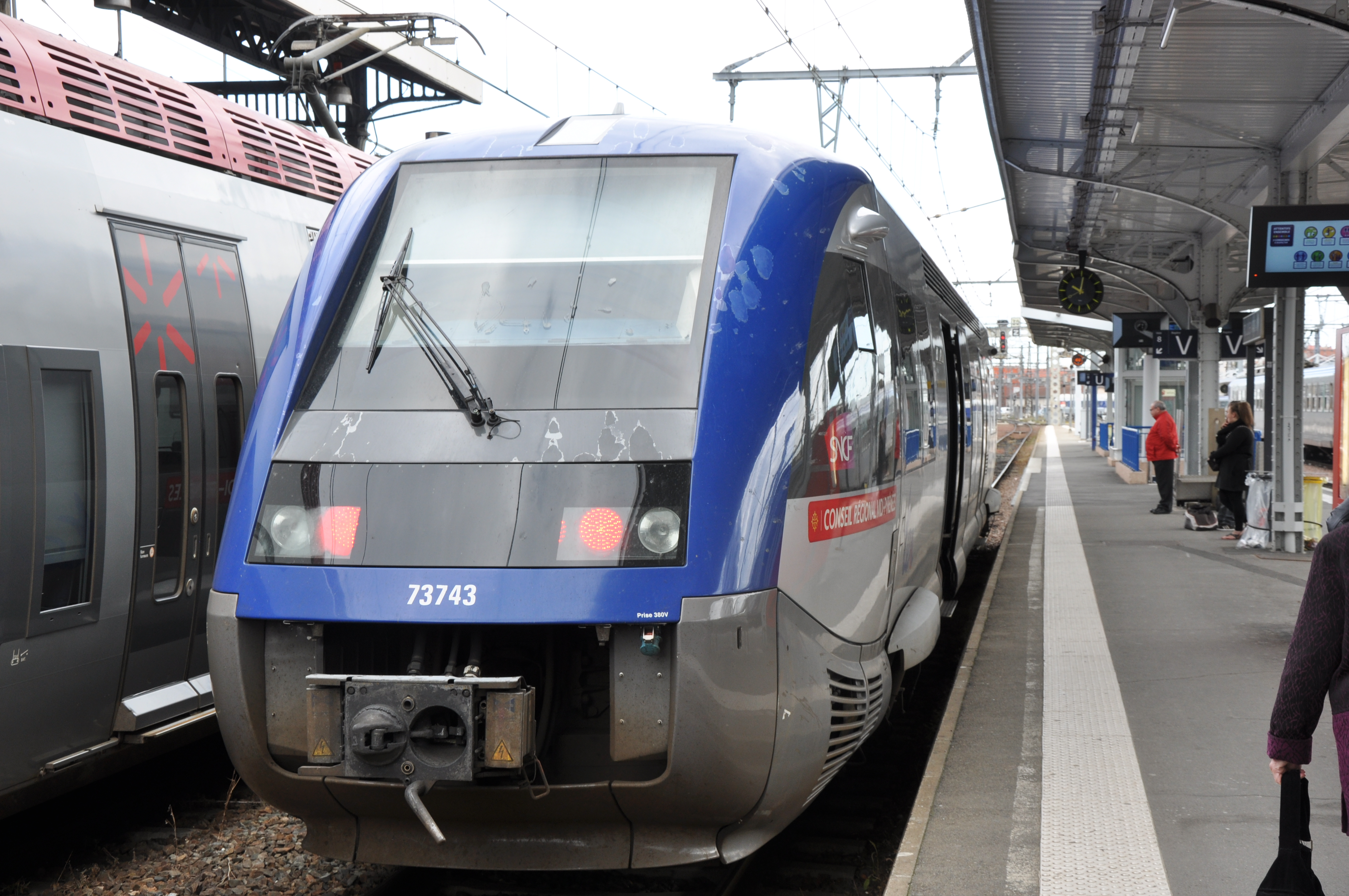 Gare de Toulouse-Matabiau, Toulouse, Midi-Pyrénées, France